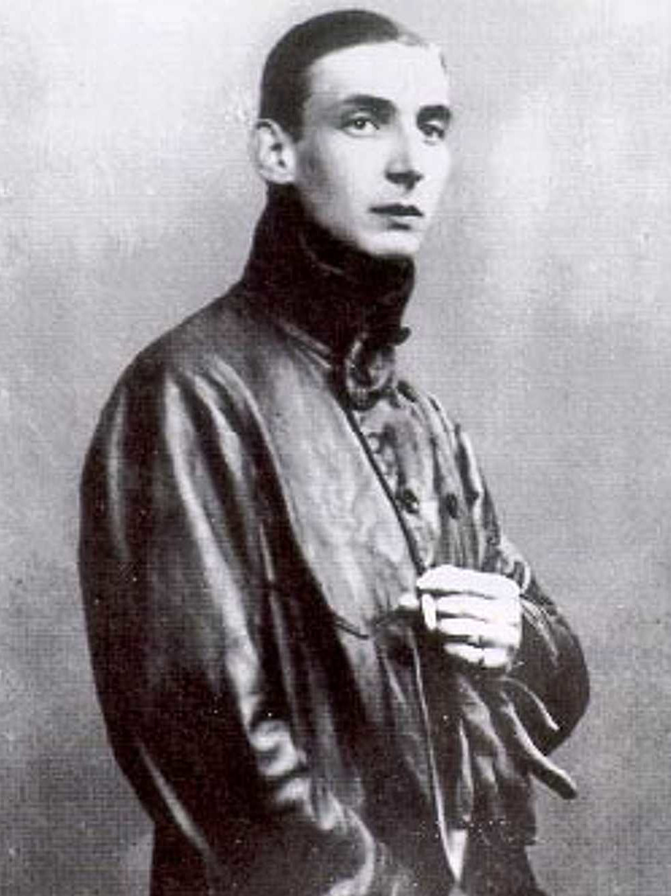 Almásy László magyar utazó, pilóta, Afrika-kutató, felfedező.